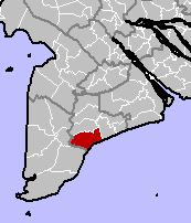 District, Bac Lieu Province, Vietnam.